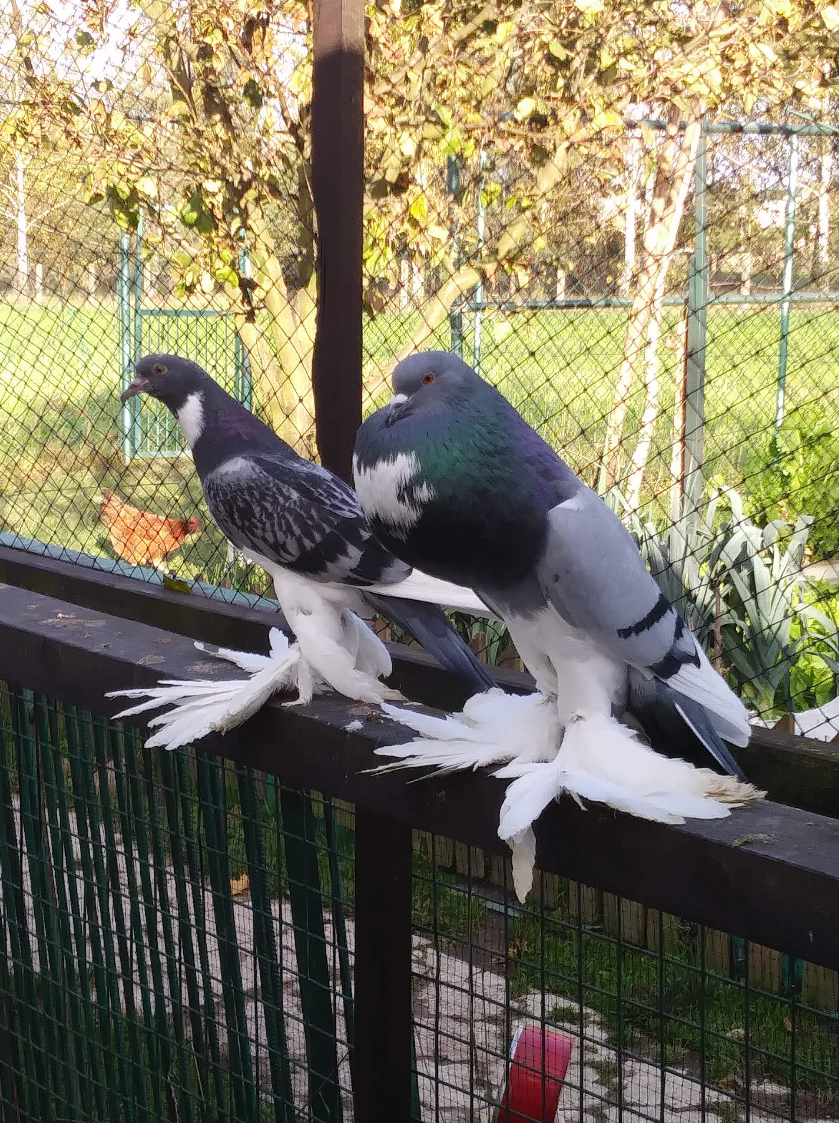 Garłacze Pomorskie, pd lewej: młody gołąb z 2018 roku, samiec z 2015 roku - gołębie z hodowli Arkadiusza Niełacnego